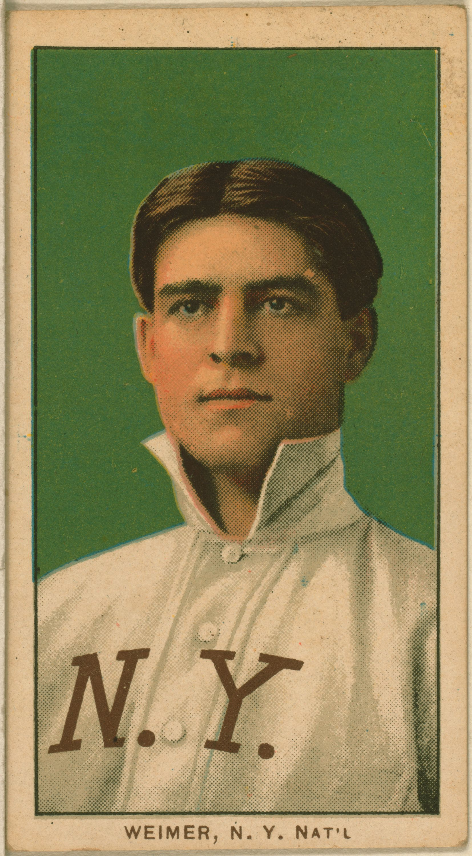 Jake Weimer